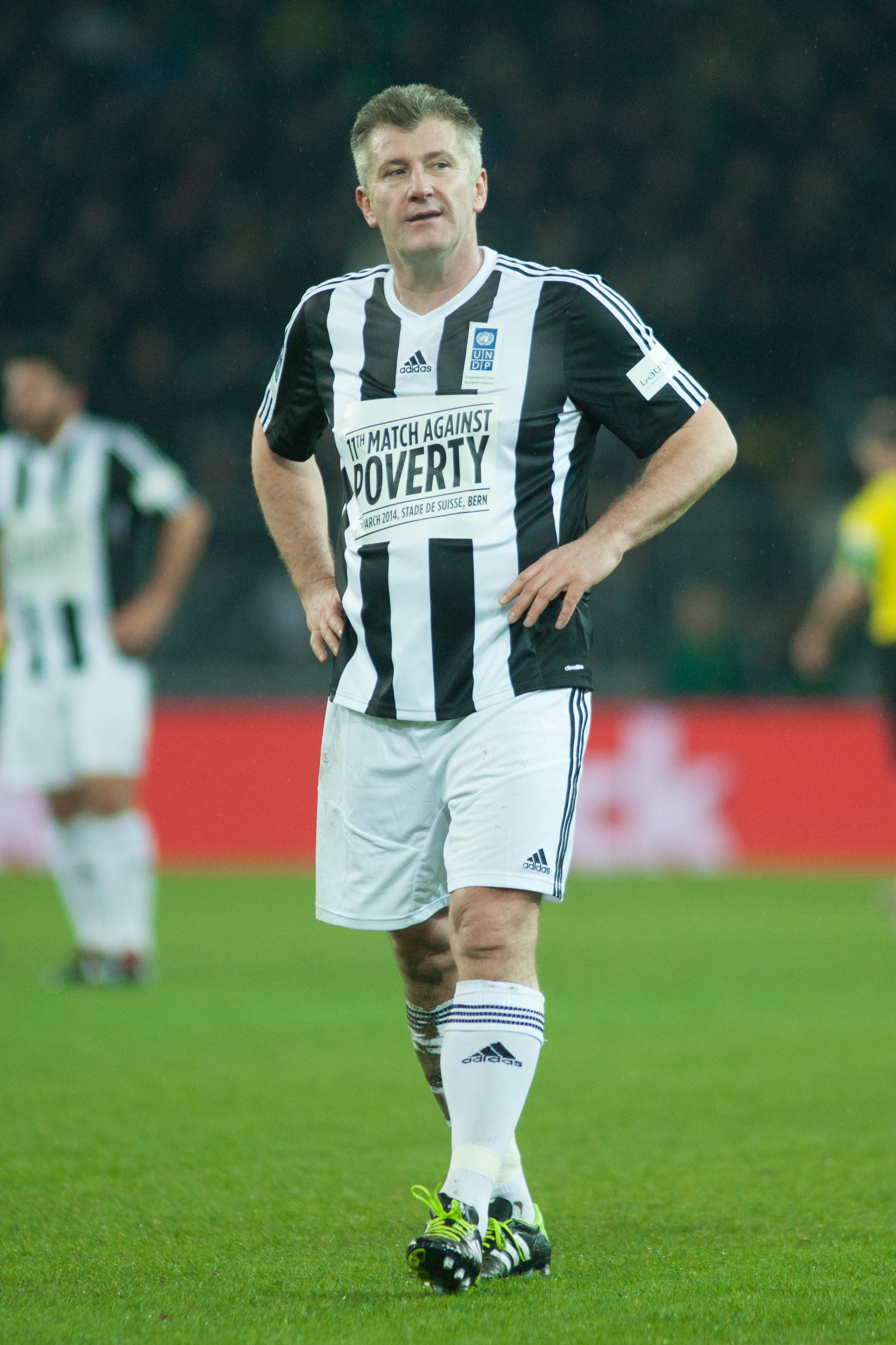 Football against poverty 2014 - Davor Šuker